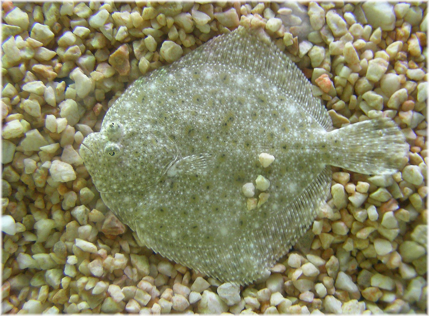 Rodaballo, Galiza